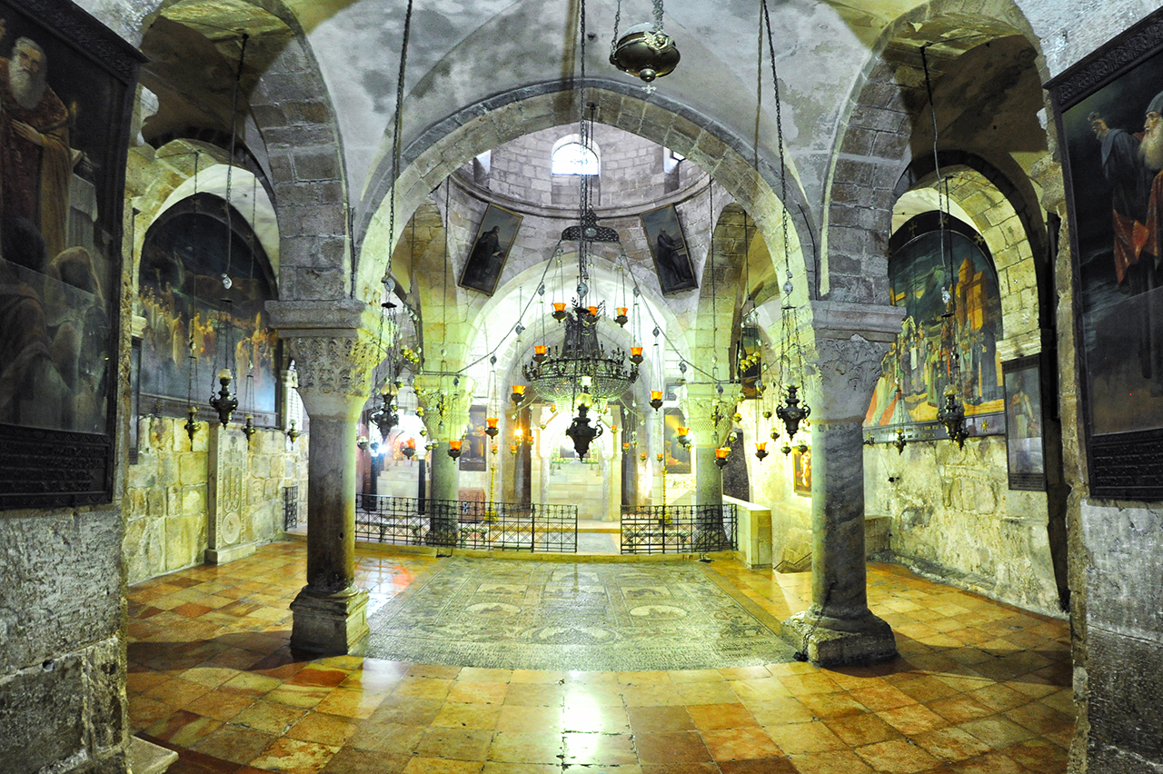 В ожидании паломников